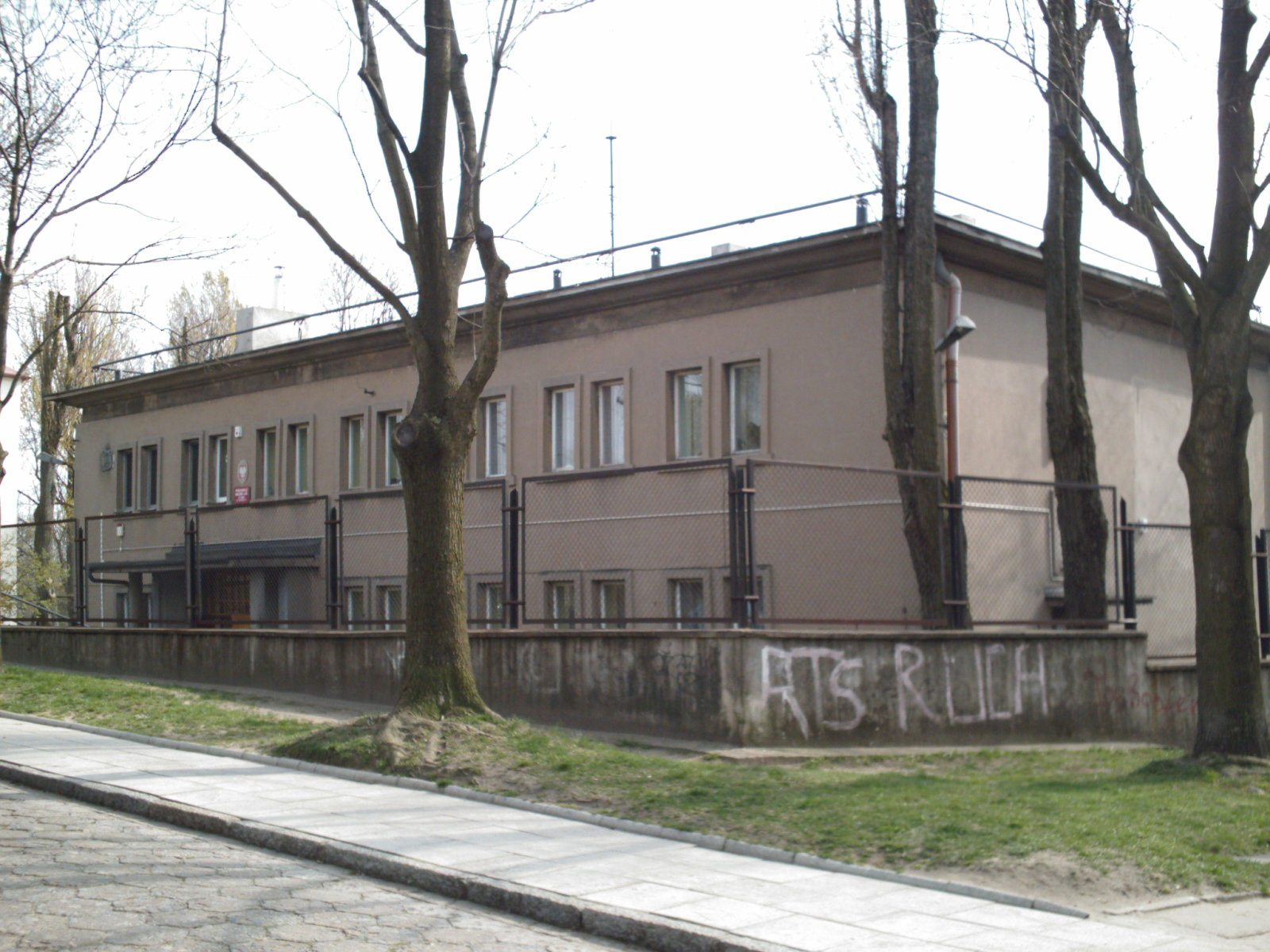 Przedszkole Miejskie nr 63 w Łodzi na Stokach przy ulicy Potokowej